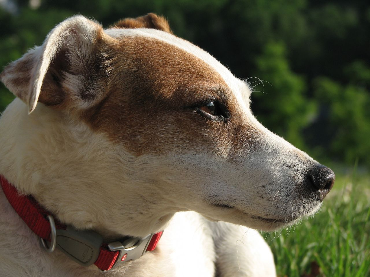 A Jack Russell Terrier.